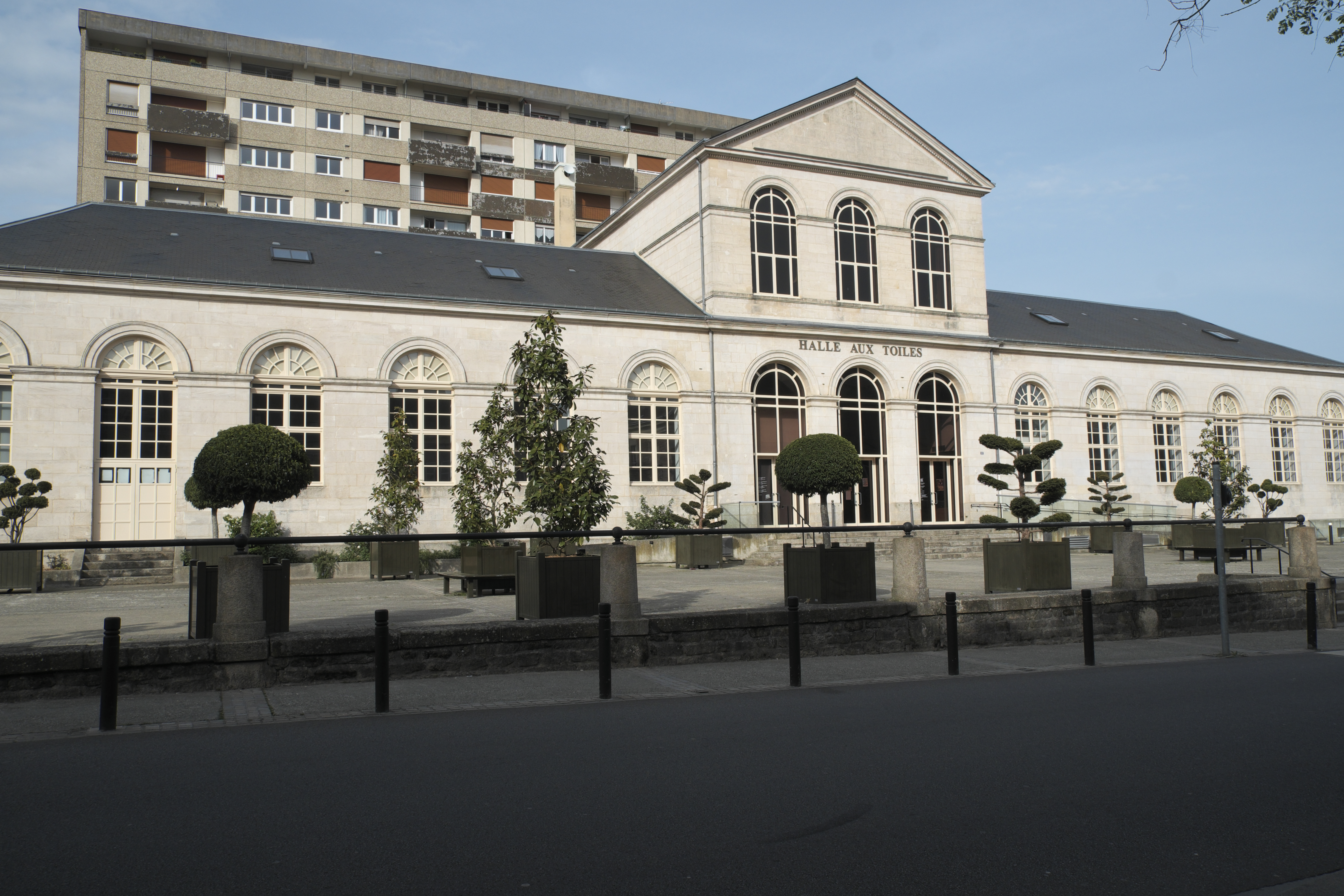 Tuchhalle (halle aux toiles) in Alençon im Département Orne (Region Normandie/Frankreich)